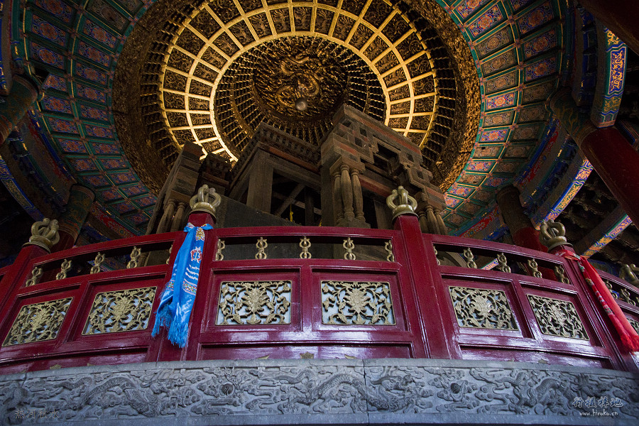 中文（中国大陆）: 立体“曼陀罗”坛城